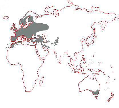 Omarbetad version av Image:Turdus_merula_distribution.jpg tagen från Commons. Har rättat till utbredningen i Australien koncentrerat utsnittet.